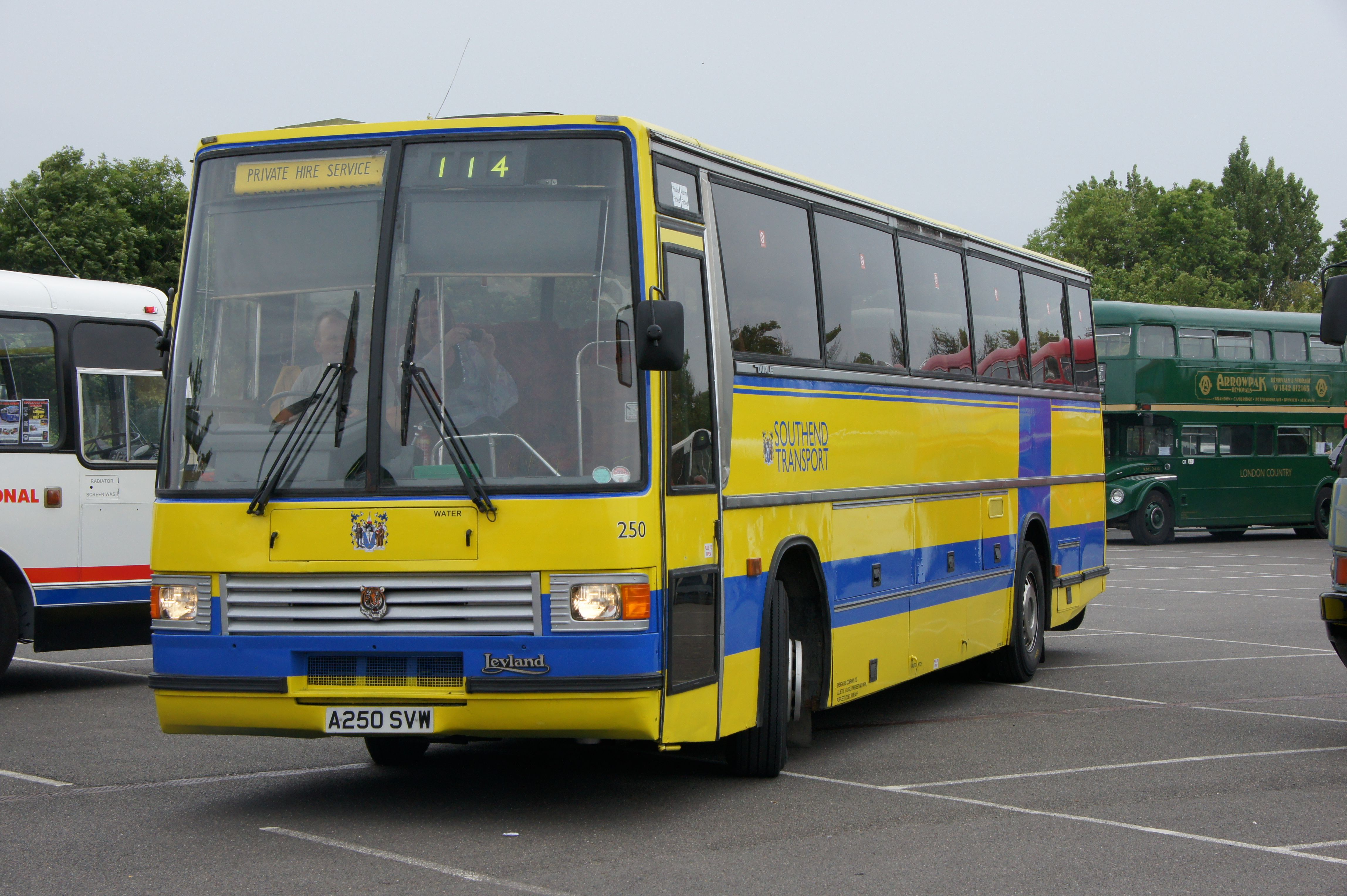 A250SVW-1 050611 CPS